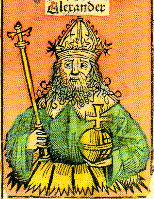 Porträt von Alexander, römischer Kaiser